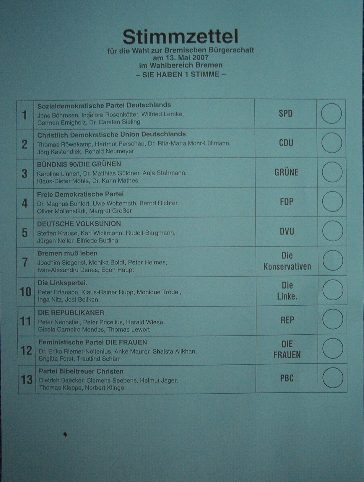 Wahlzettel zur Wahl der Bremer Bürgerschaft 2007